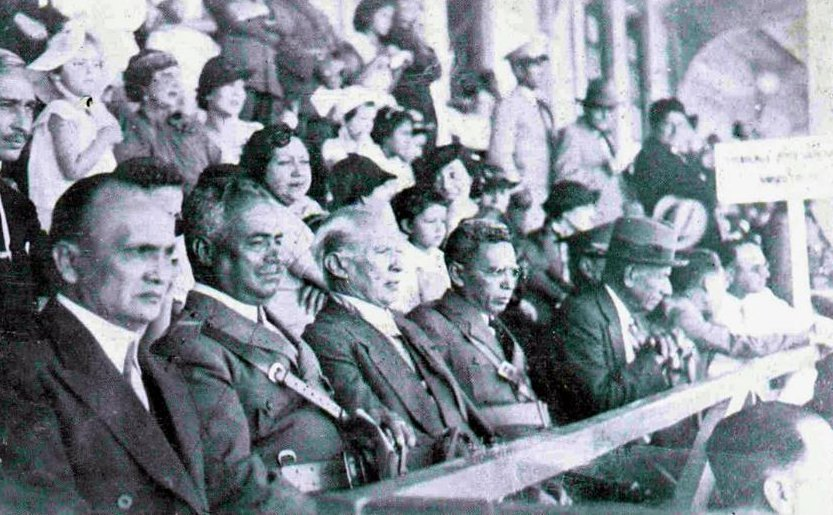 El General Martinez Durante La ignaguracion Del Estadio Flor Blanca.